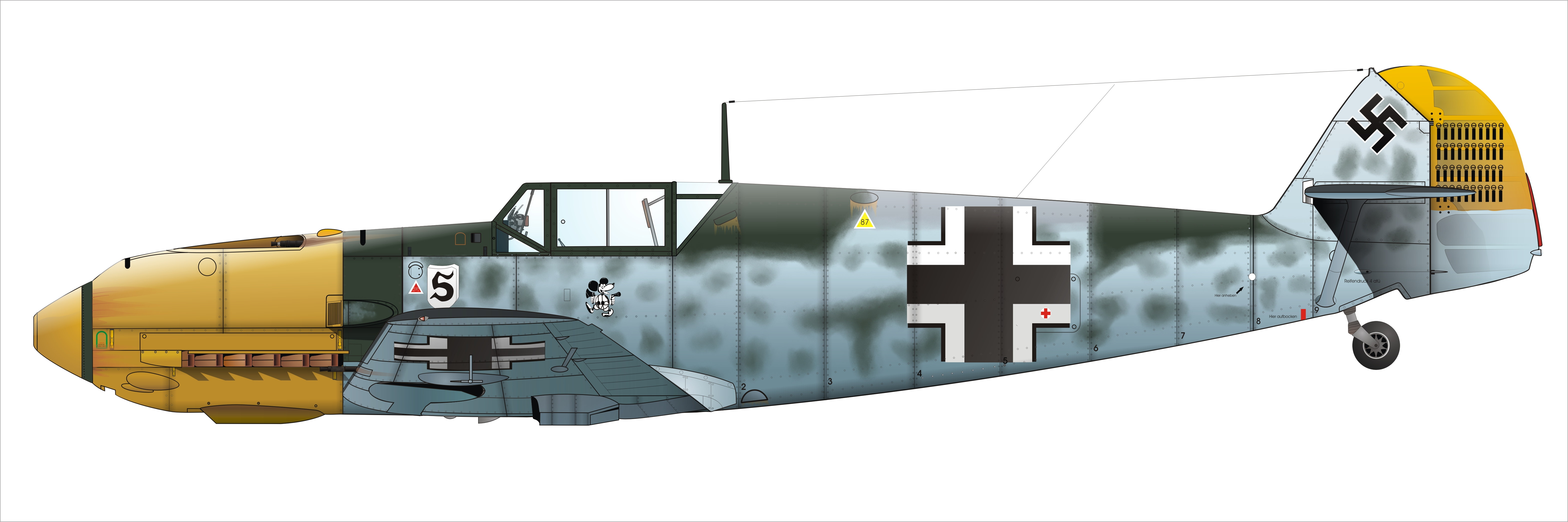 Bf 109 E-4, Maschine von Adolf Galland, Sommer 1940, Stab/JG 26